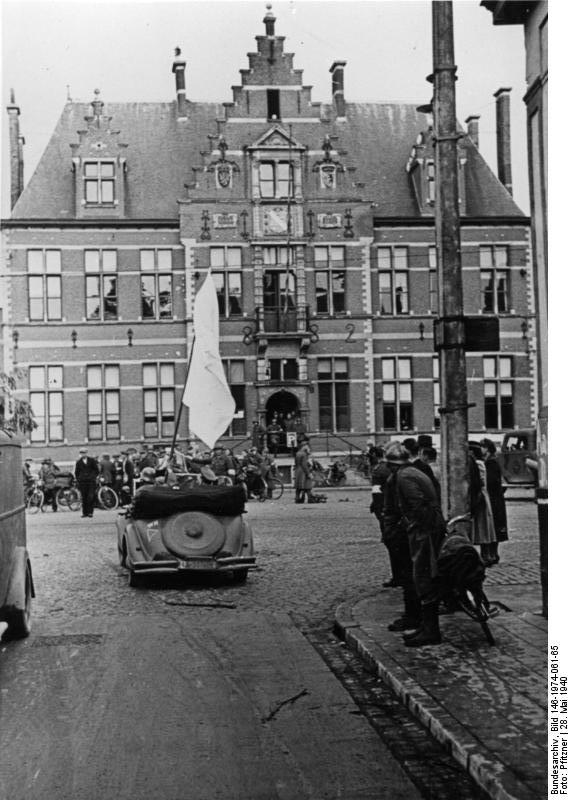 Heeresfilmstelle Negativ-Nr. P.K. 88/9 Aufnahme am : 28.05.40 Land: Im Westen Kapitulation der belg. Armee. Deutscher Parlamentär trifft im belg. Hauptquartier ein. [Oostkamp]